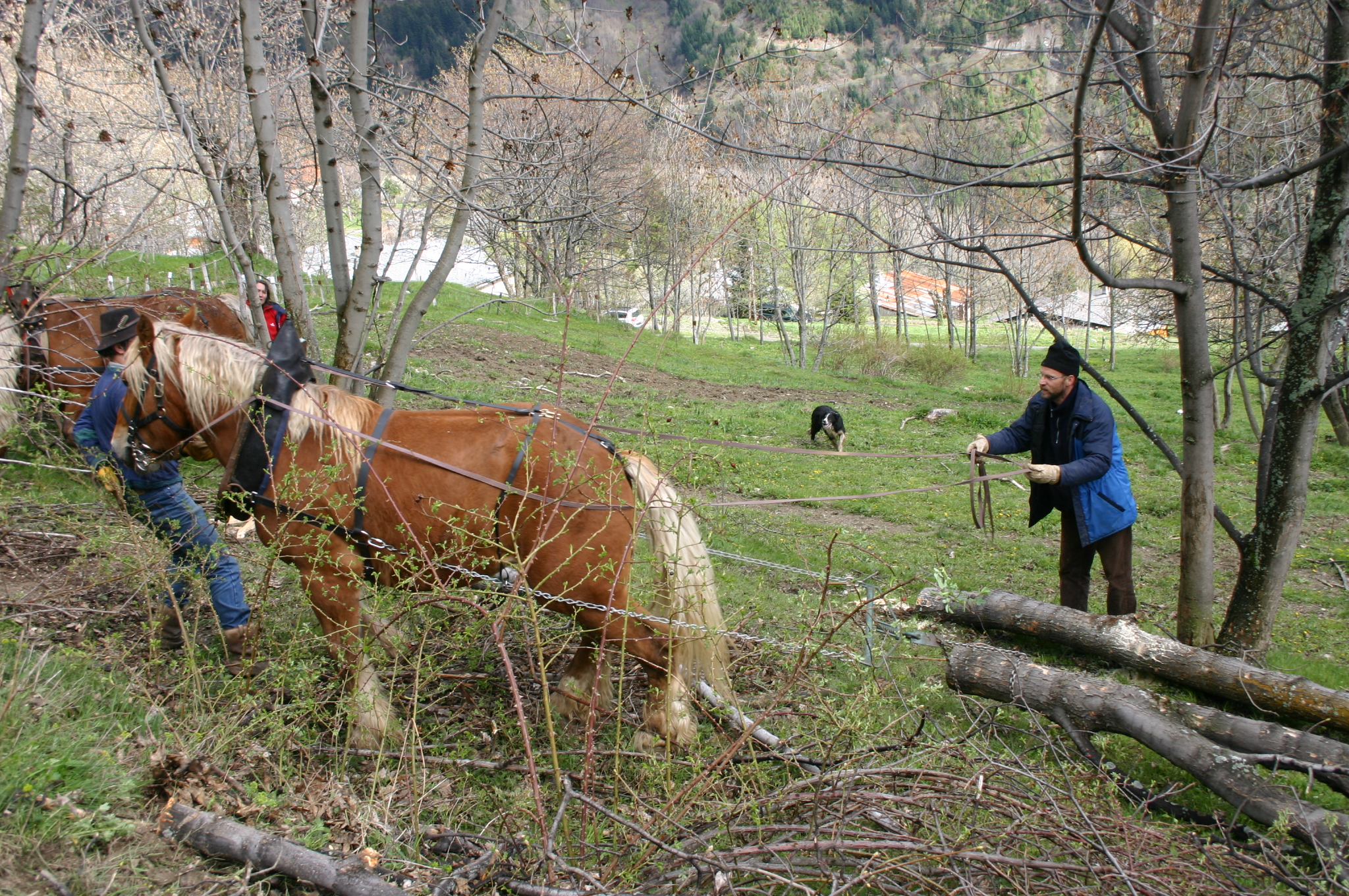 Cheval de Trait, pendant les exercices de l'association hippotese à Montdenis (Savoie)